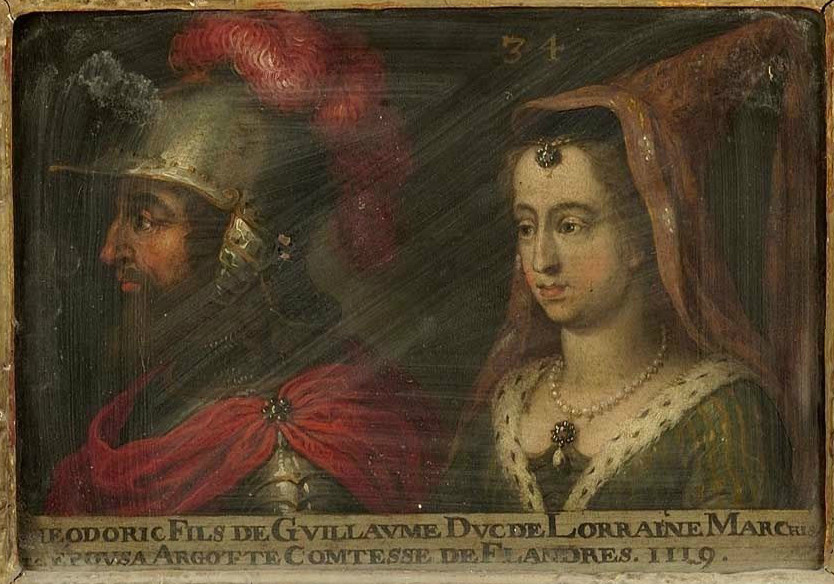 Portrait de Thierry II, duc de Lorraine de 1070 à 1115, et de son épouse Argotte de Flandre. Ce tableau fait partie d'une suite d'une soixantaine de double-portraits représentant les ducs et duchesses de Lorraine ainsi que leurs ancêtres supposés. La légende comporte quelques erreurs par rapport à la réalité historique : Thierry y est donné à tort pour le fils de Guillaume de Lorraine (personnage fictif) et son épouse est prénommée Argotte au lieu de Gertrude. Musée des Offices, Florence (Inv. 1890, 644)